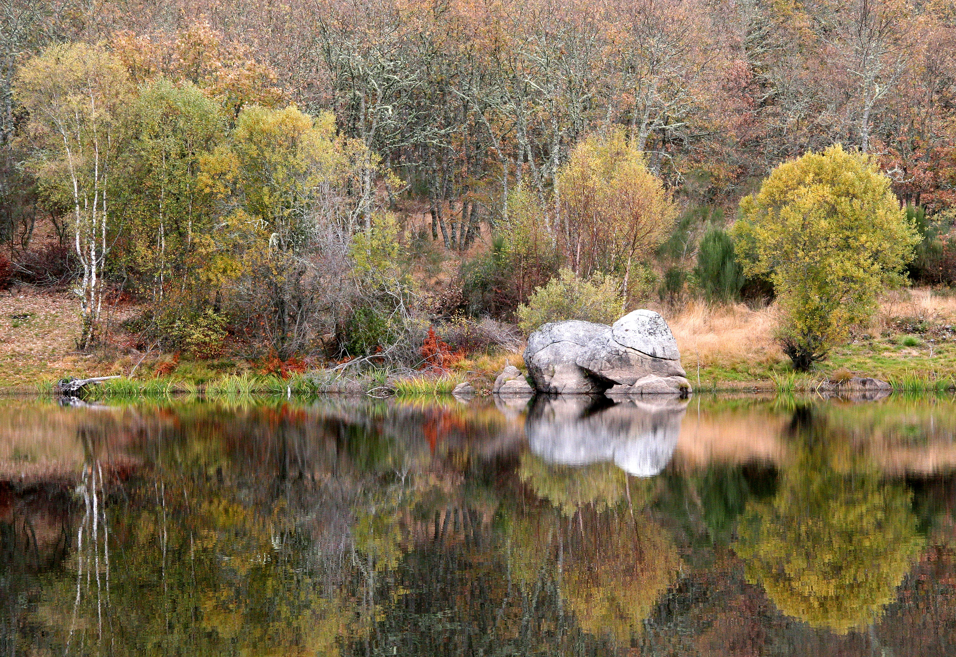 Gerês